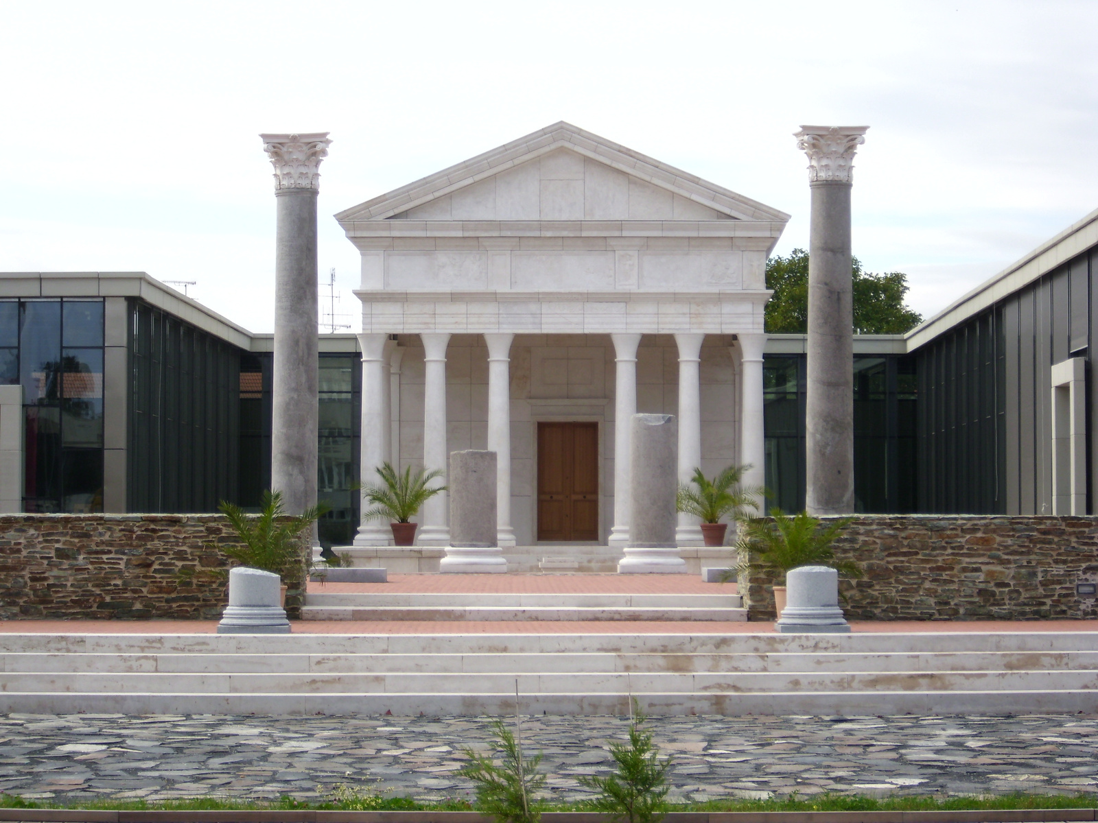 Iseum (Szombathely, Zrínyi Ilona utca 9.) This is a photo of a monument in Hungary, Identifier: 9446